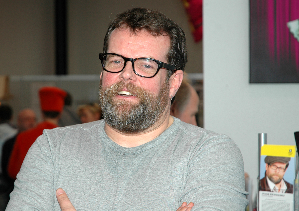 Jochen Malmsheimer in Freiburg, Internationale Kulturbörse 2012